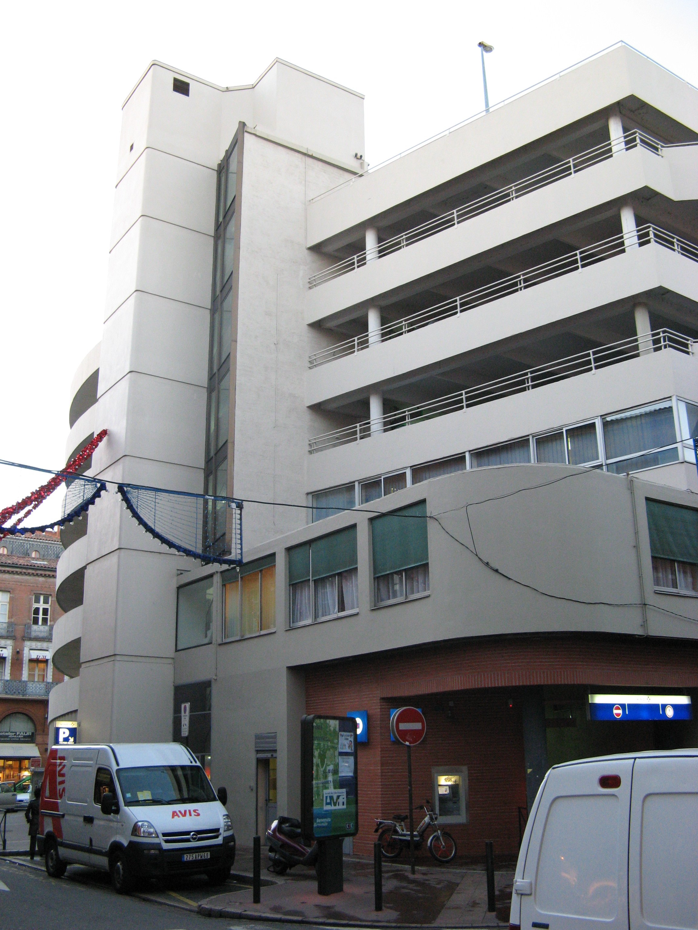 Marché Victor Hugo, Place Victor Hugo, Toulouse, France